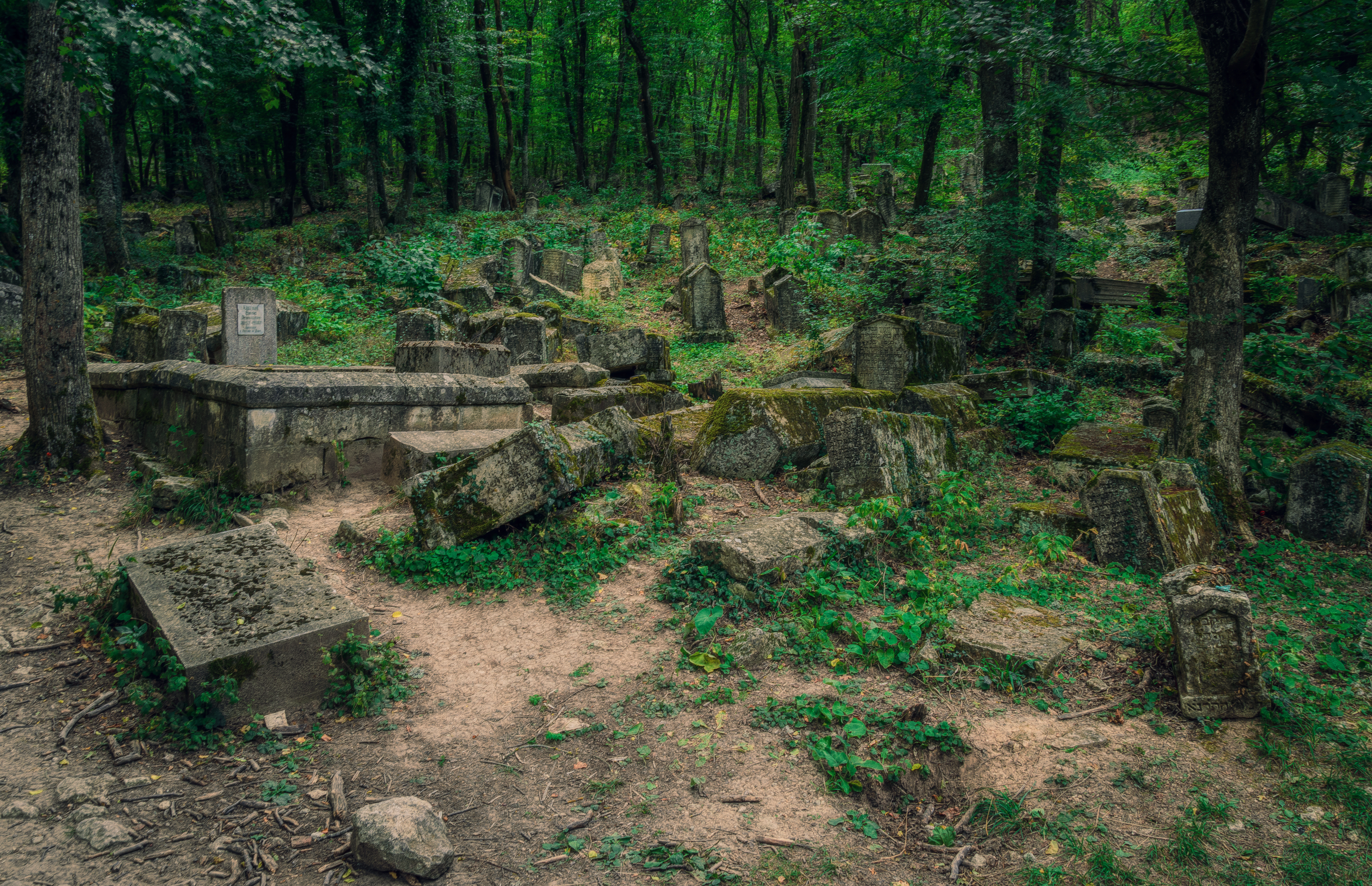 Чуфут-Кале: Бахчисарай, Бахчисарайский район, Крым This object is located on the Crimean Peninsula and recognized as cultural heritage by Russia under the monument ID: 8232033000. The legal status of the Crimean region is currently disputed.